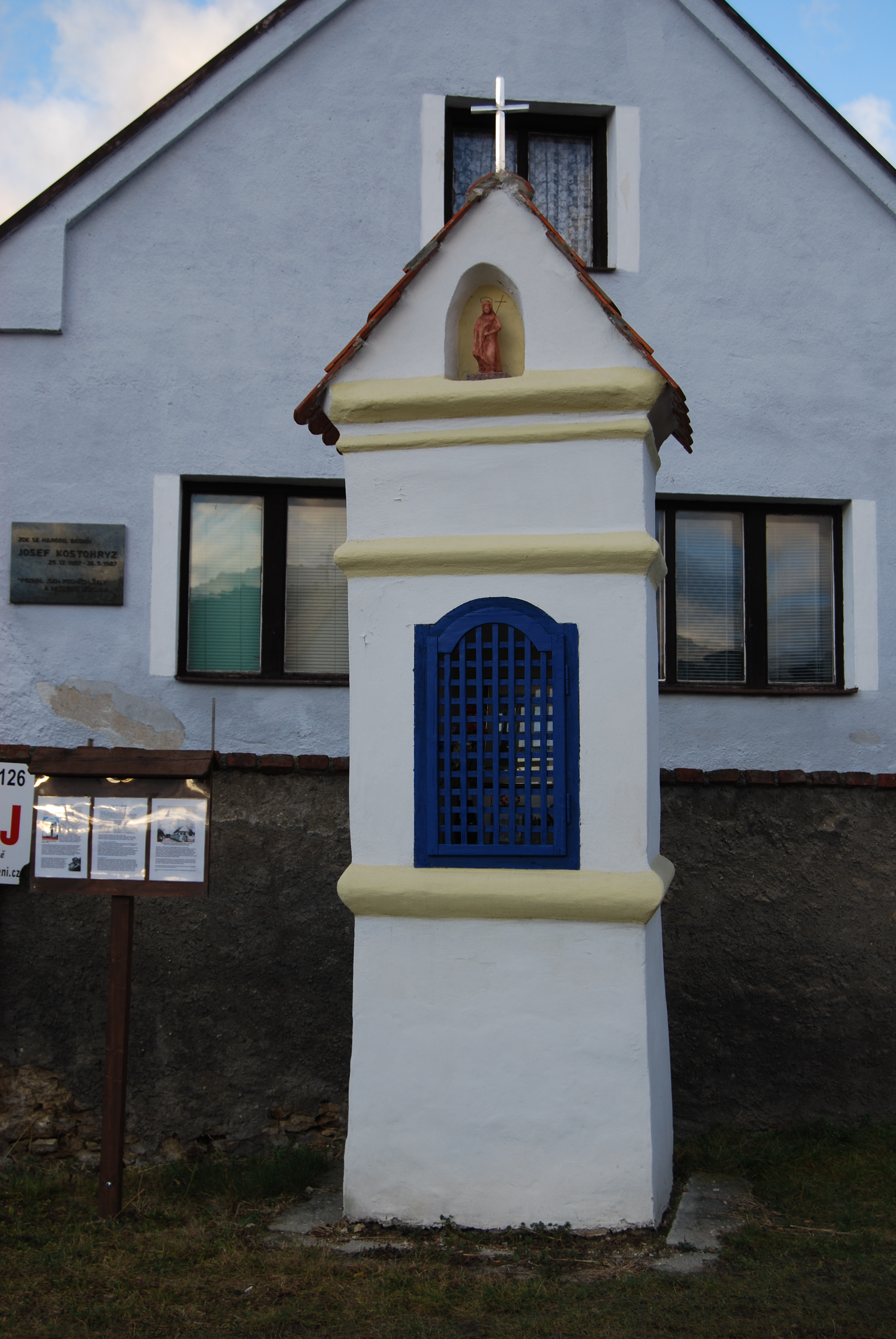 Výklenková kaple svatého Jana Nepomuckého a dům čp. 65-rodiště Josefa Kostohryze. Křenovice. Okres Písek. Česká republika.